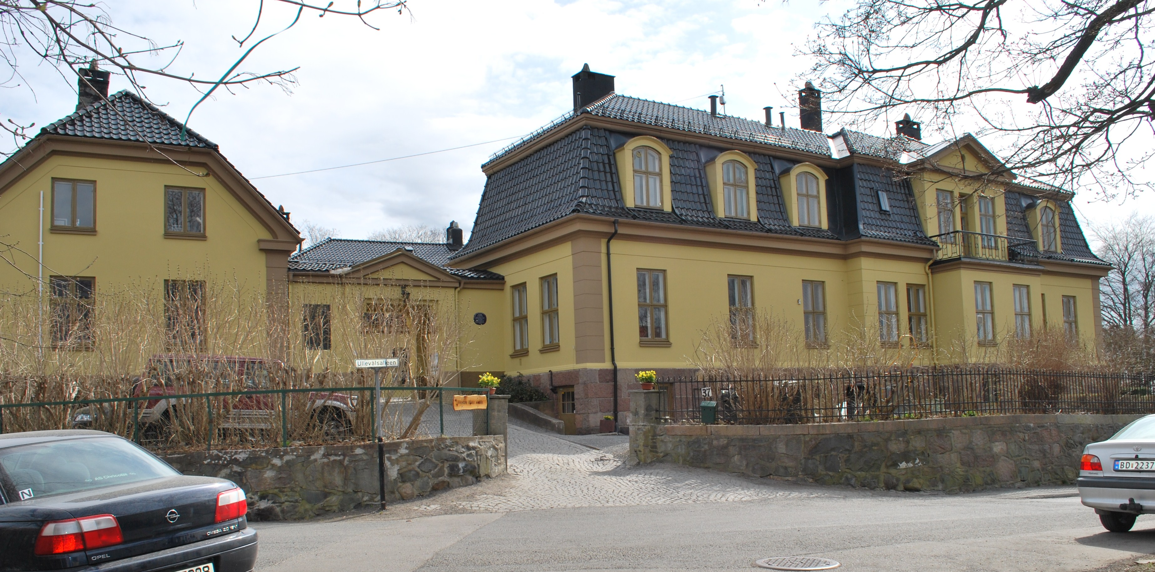 Norsk (bokmål): Store Ullevål gård, i dag Vestre Aker skole, på Ullevål i Oslo